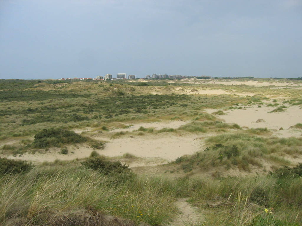 Natuurreservaat De Westhoek met in de verte De Panne. Foto door Tim Bekaert.